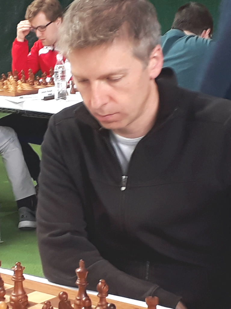 Ognjen Jovanic, Runde 4 Mitropa Cup 2019 in Radenci.